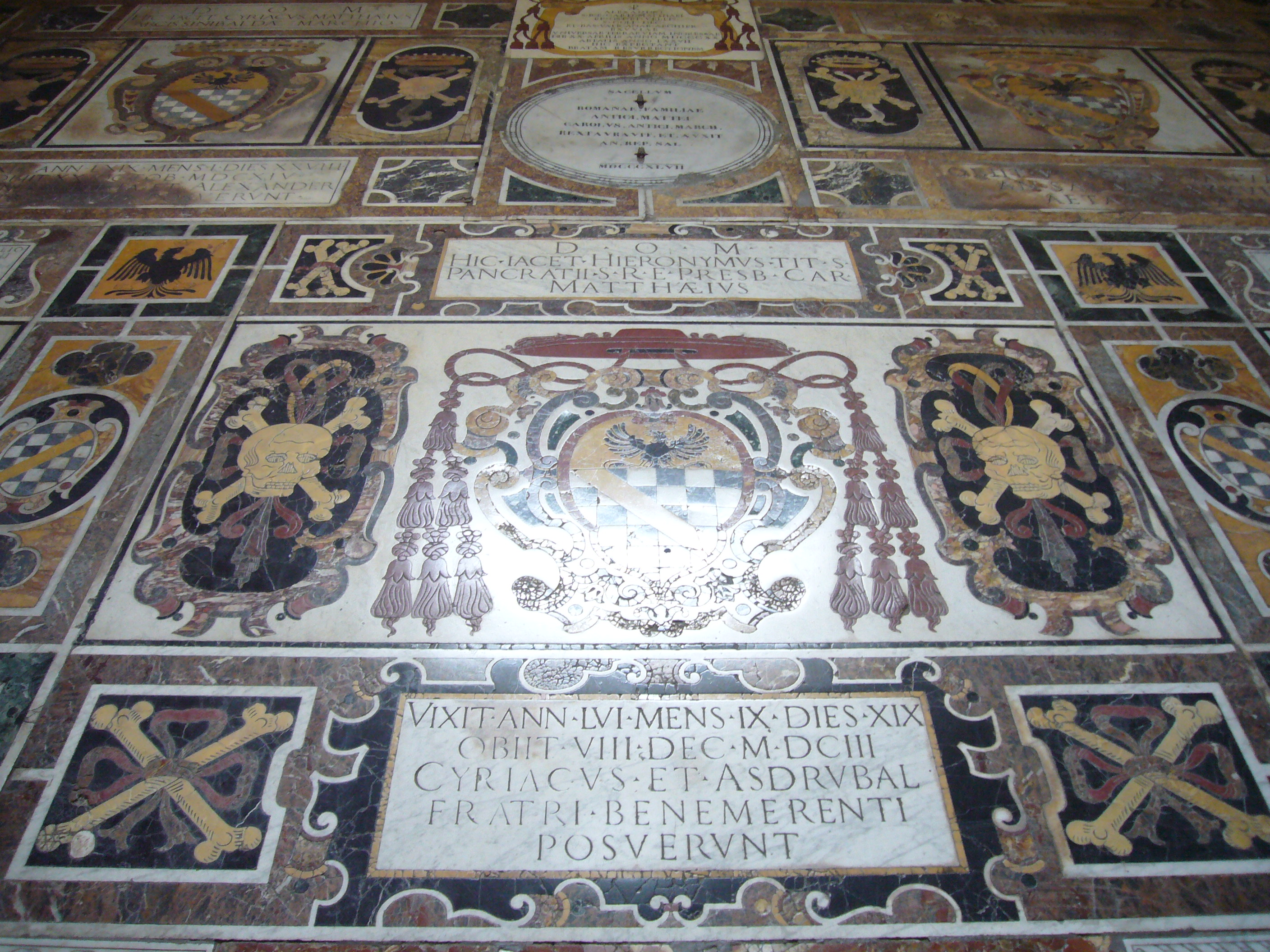 Roma, s. Maria in Aracoeli, sepolcro di Gerolamo Mattei